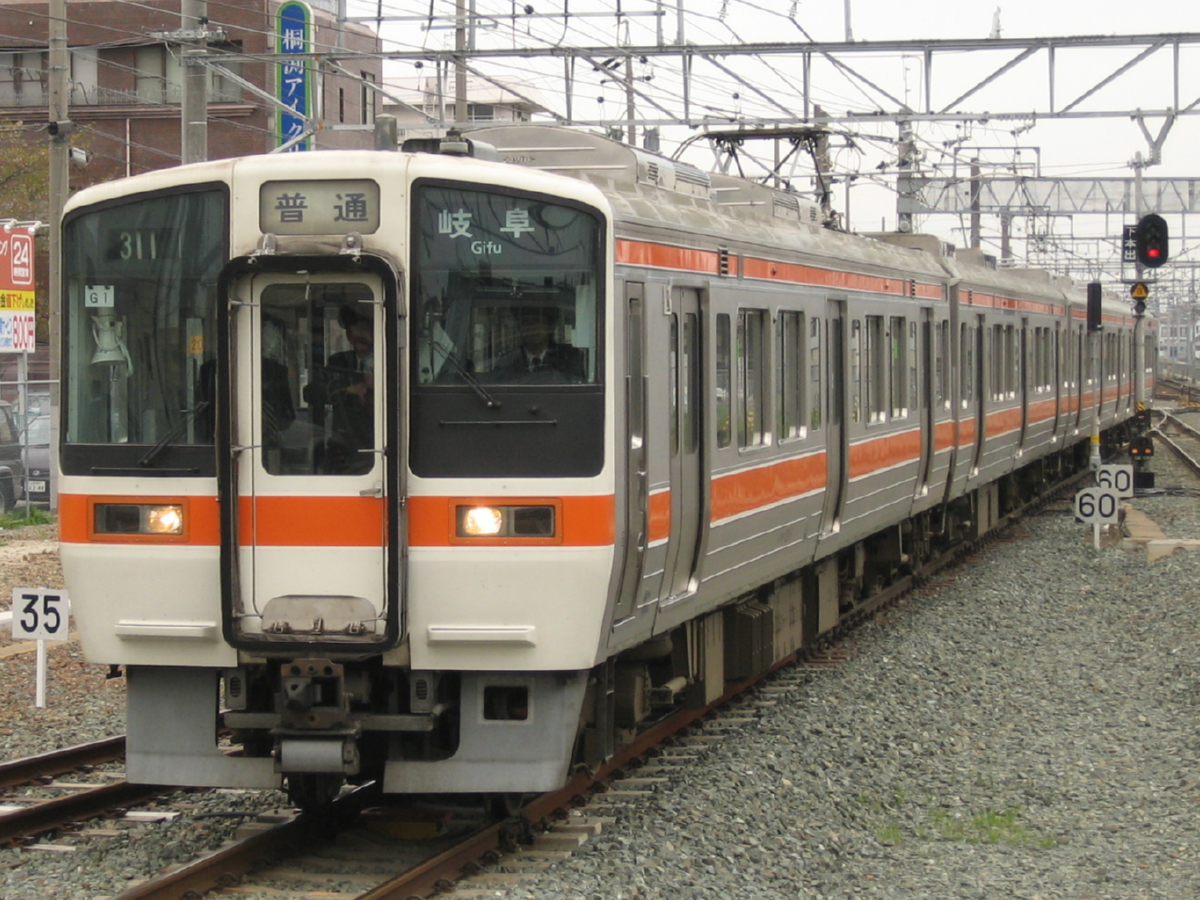 東海旅客鉄道311系